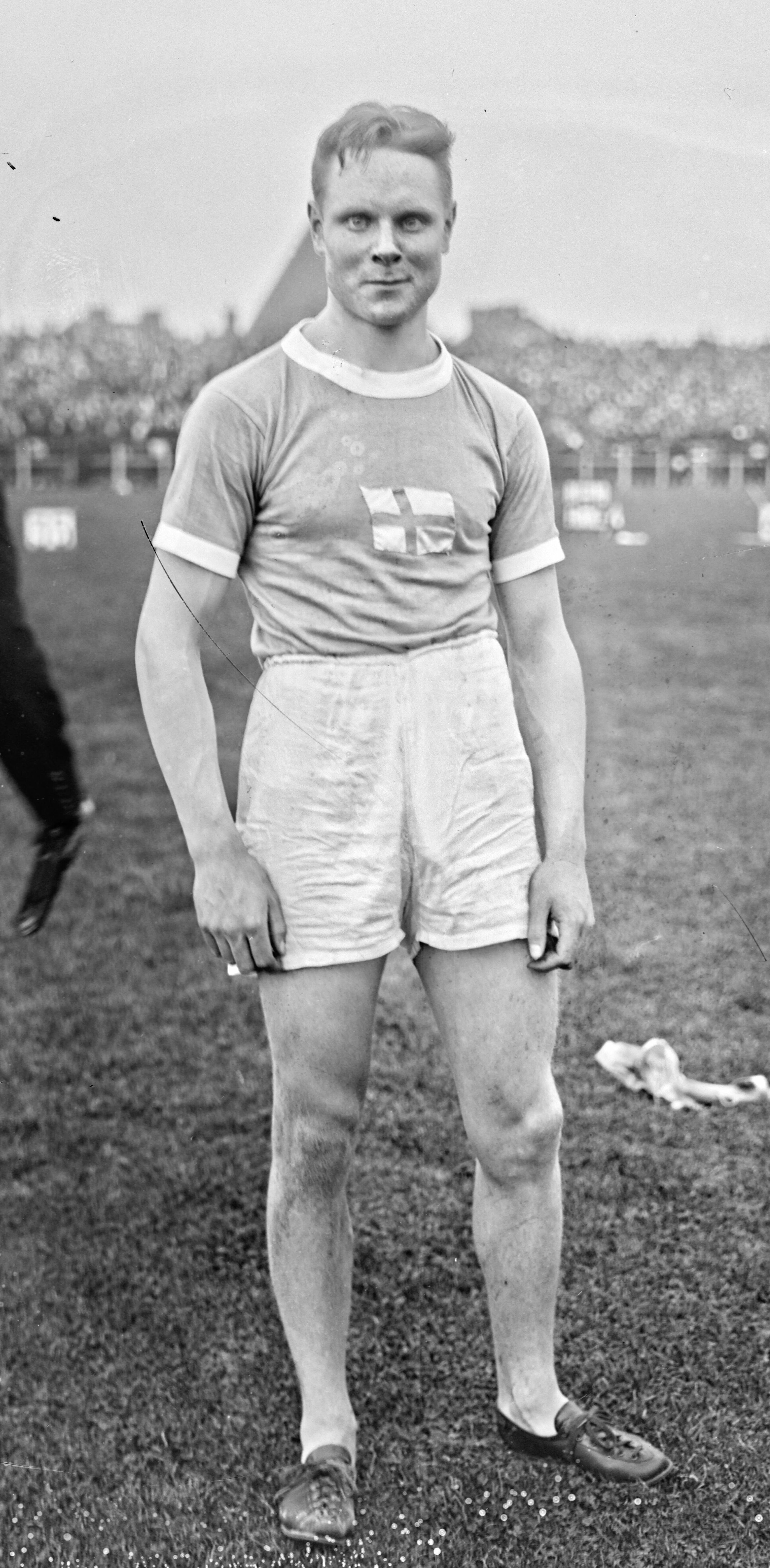 Kraemer [stade Bergeyre, match France-Finlande d'athlétisme, le 23 septembre 1922] : [photographie de presse] / [Agence Rol]